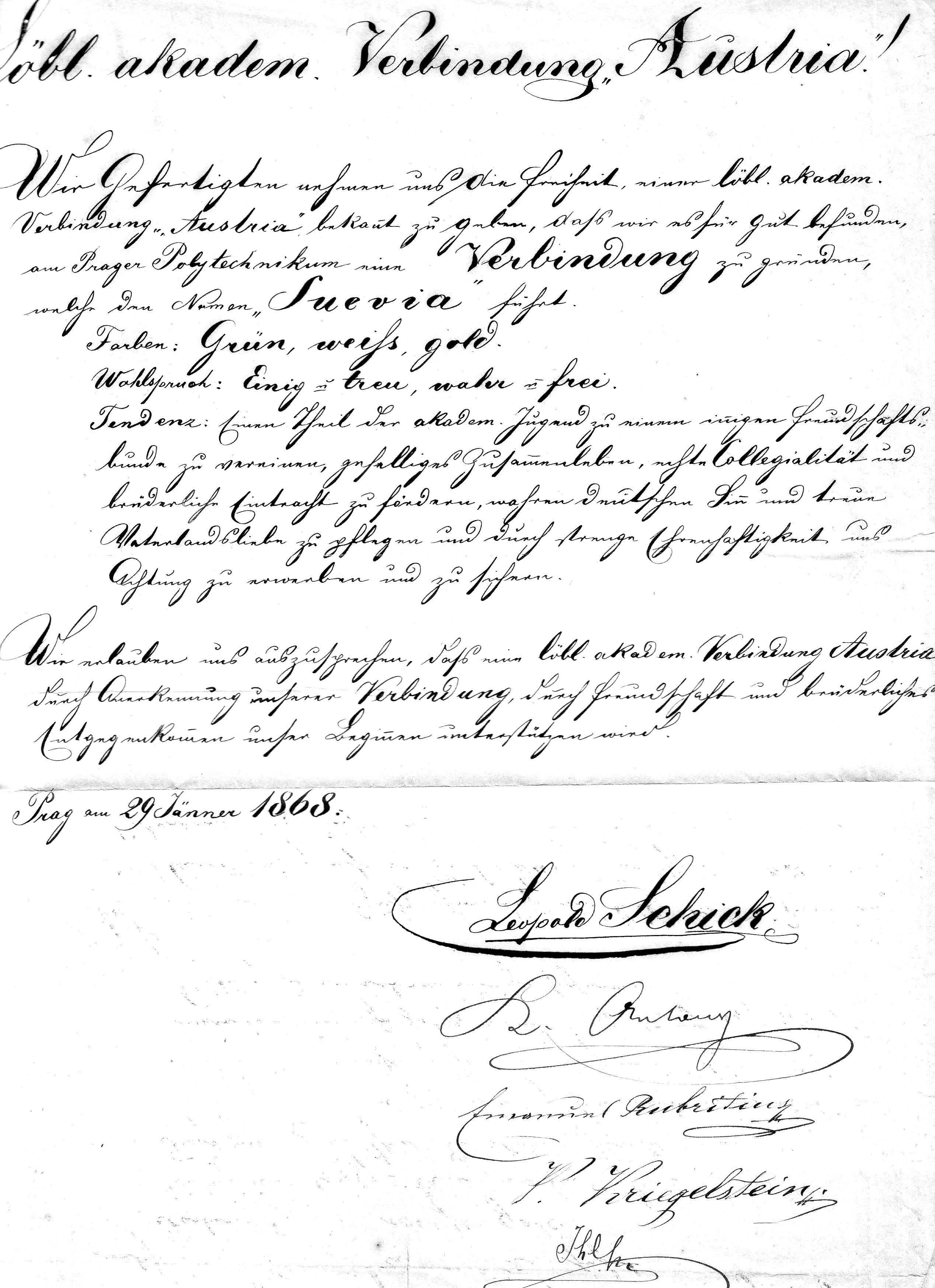 Brief der Suevia Prag an die Austria Prag mit der Mitteilung über die Gründung der Suevia